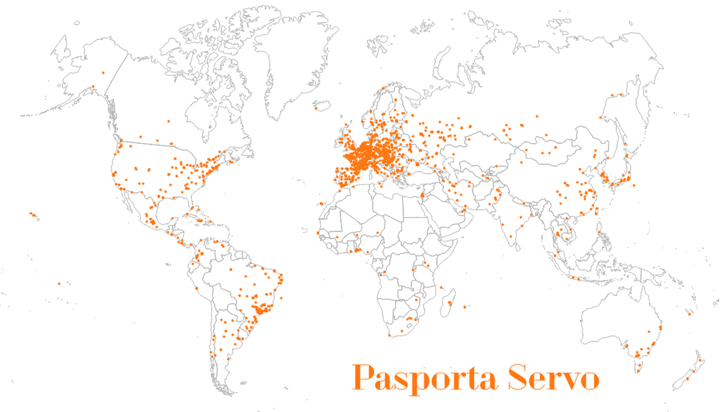 La gastigantoj de Pasporta Servo en 2015